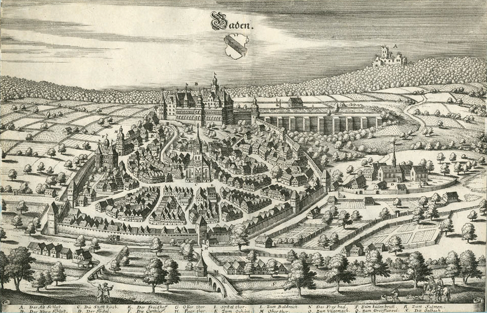 Baden, Kupferstich bei Matthaeus Merian, Topographia Sueviae, um 1650